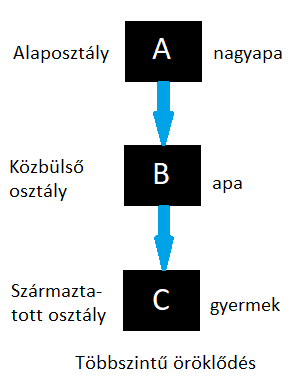 Többszintű öröklődés illusztrációja